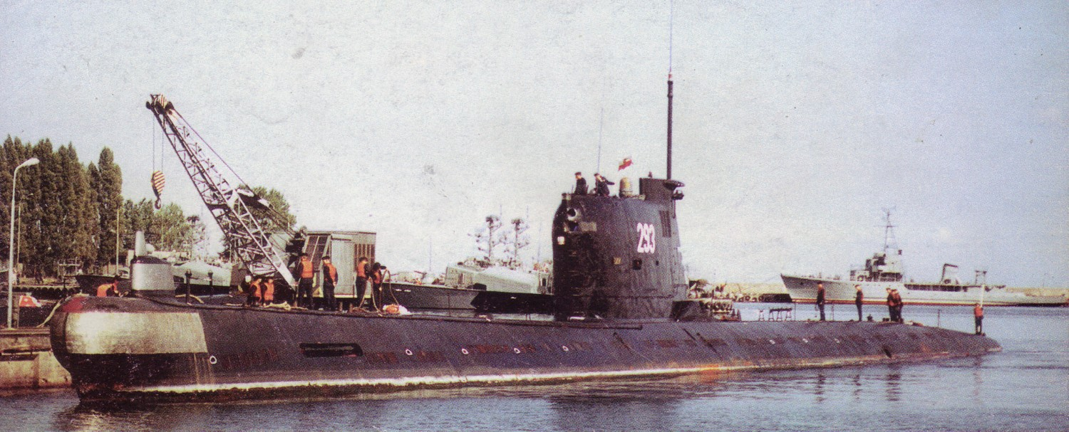 ORP Dzik